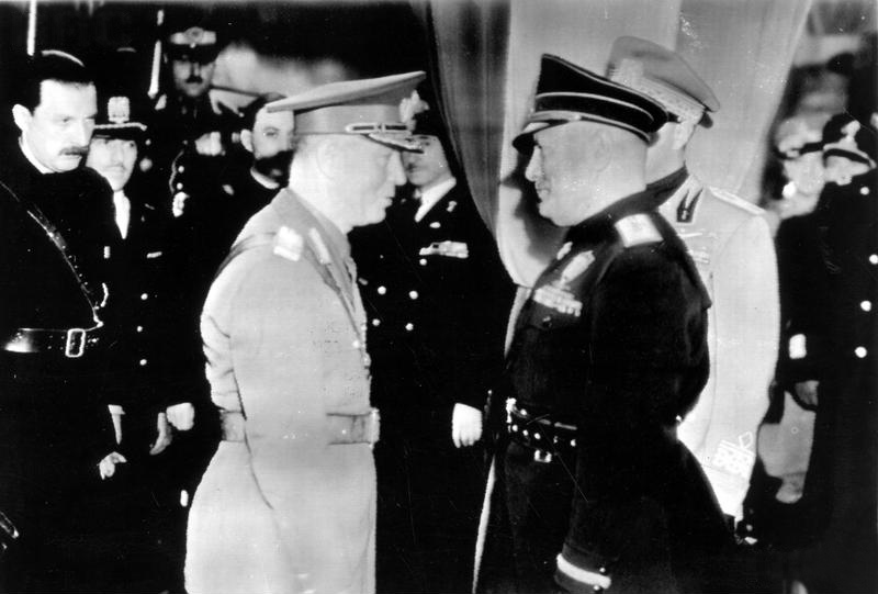 Visita del caudillo rumano Ion Antonescu al italiano Benito Mussolini en Roma, en noviembre de 1940.